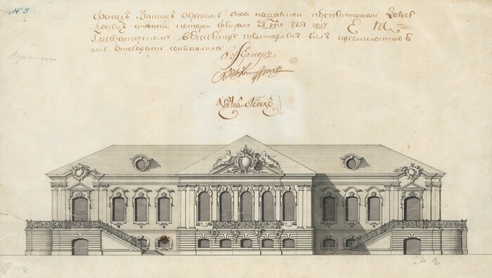 Srednyaya Rogatka Palace near St. Petersburg (1750-54)